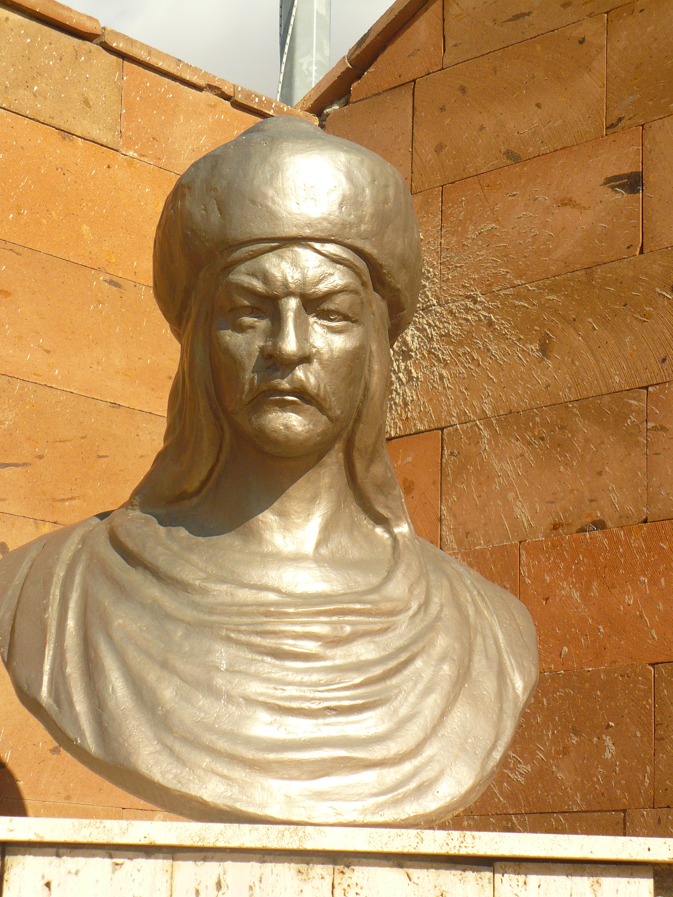 Pınarbaşı'nda kamuya açık park ve sergilenen heykeller